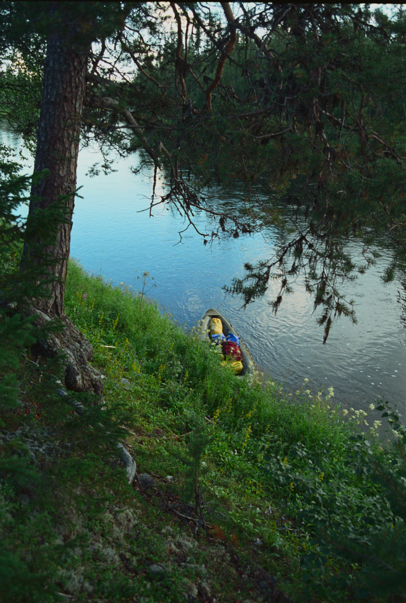 Варзугский заказник: Бассейн реки Варзуга, река Пана, Терский район, Мурманская область This image is related to the protected area of Russia number 5110115